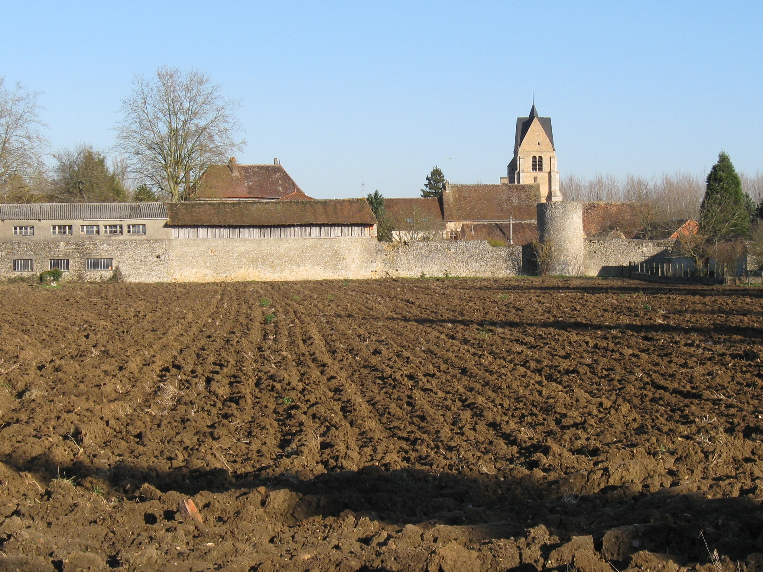 Gy-les-Nonains